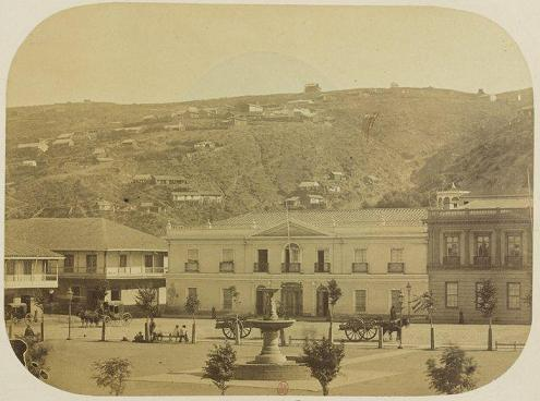 Foto de Valparaíso Antiguo